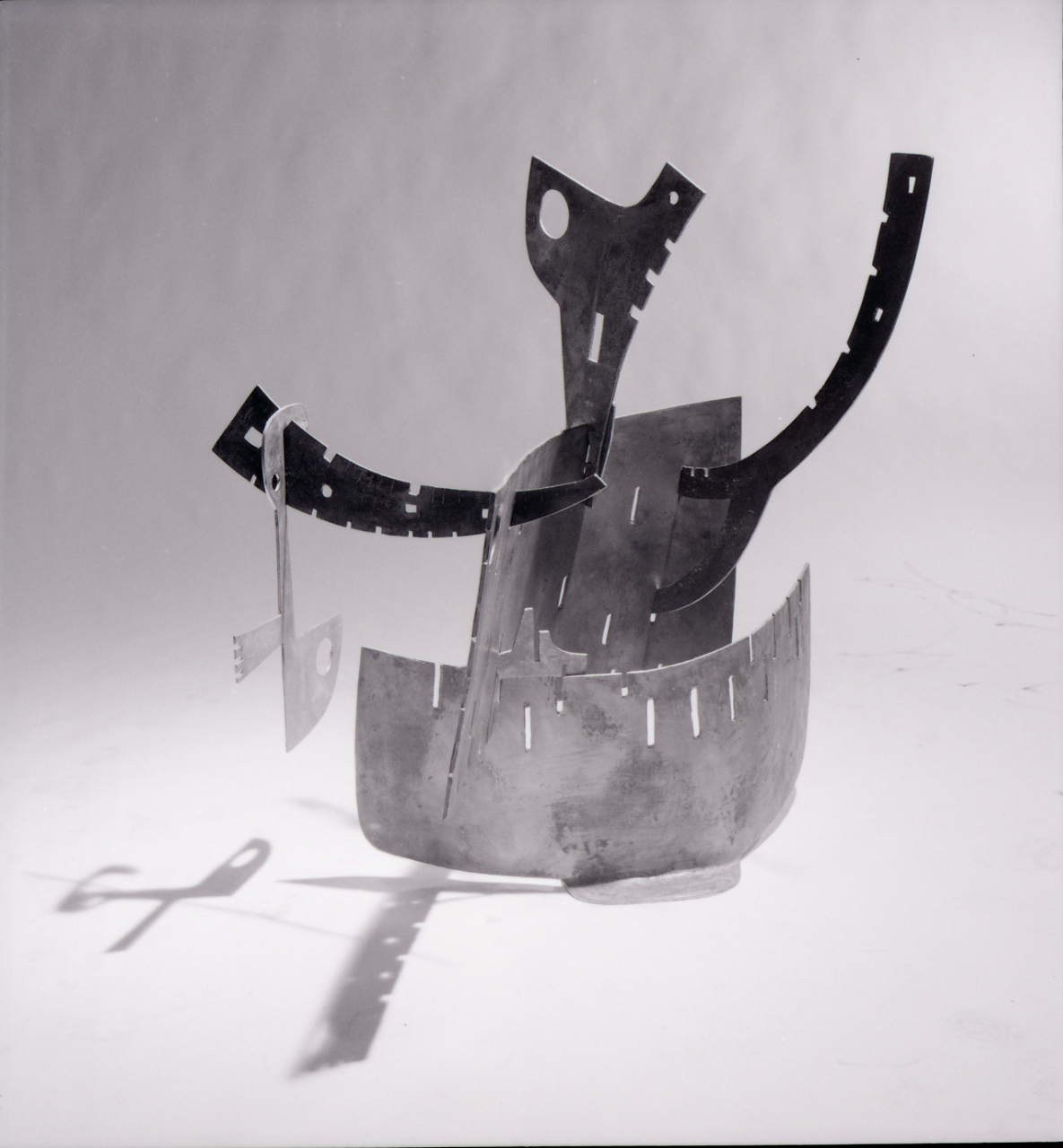 Servizio fotografico : France, 1964 / Paolo Monti. - Buste: 1, Fototipi: 12 : Negativo b/n, gelatina bromuro d'argento/ pellicola ; 6x6. - ((Serie costituita da 4 strisce di due fotogrammi ciascuna e da 4 fotogrammi sciolti. - Sulla busta: "R14697-14708 Lardera scultura Franci". - Occasione: Dott. Franci: Le collezioni dello scultore Berto Lardera in Francia per strenna 1964. - Fonte: Rubrica di Paolo Monti: Archivio fino 1-4-1961/ 31-3-1963 (1961-1963), presso Archivio Paolo Monti. - Fonte: Agenda di Paolo Monti: Monti/ 2/ 6 giugno 1964 - 31b marzo 1966/ 8194-12420 (1964-1966), presso Archivio Paolo Monti